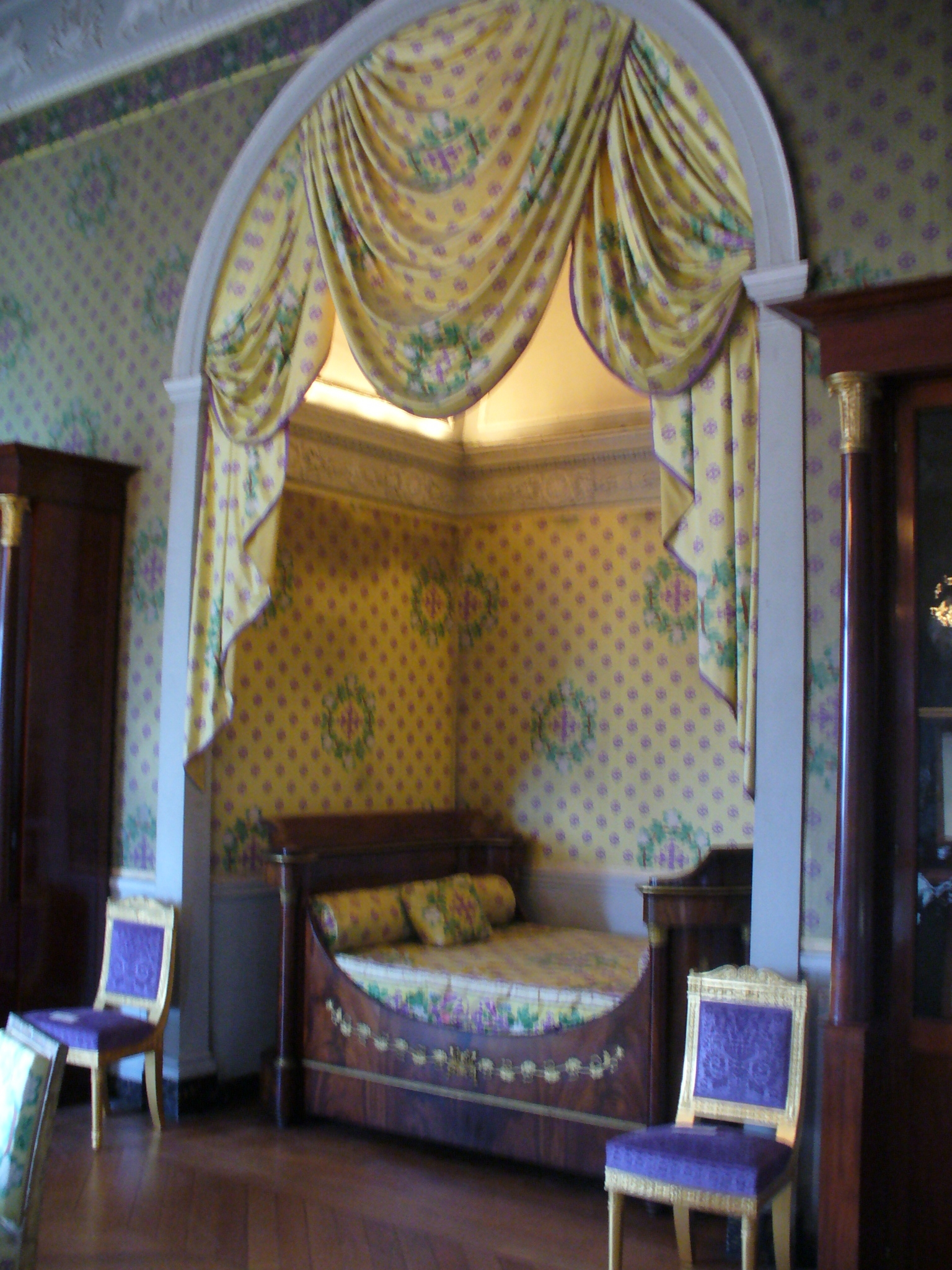 Lit de travers en bateau placé dans une alcôve ; chambre du maréchal Lannes au château de Maisons-Laffitte (78).